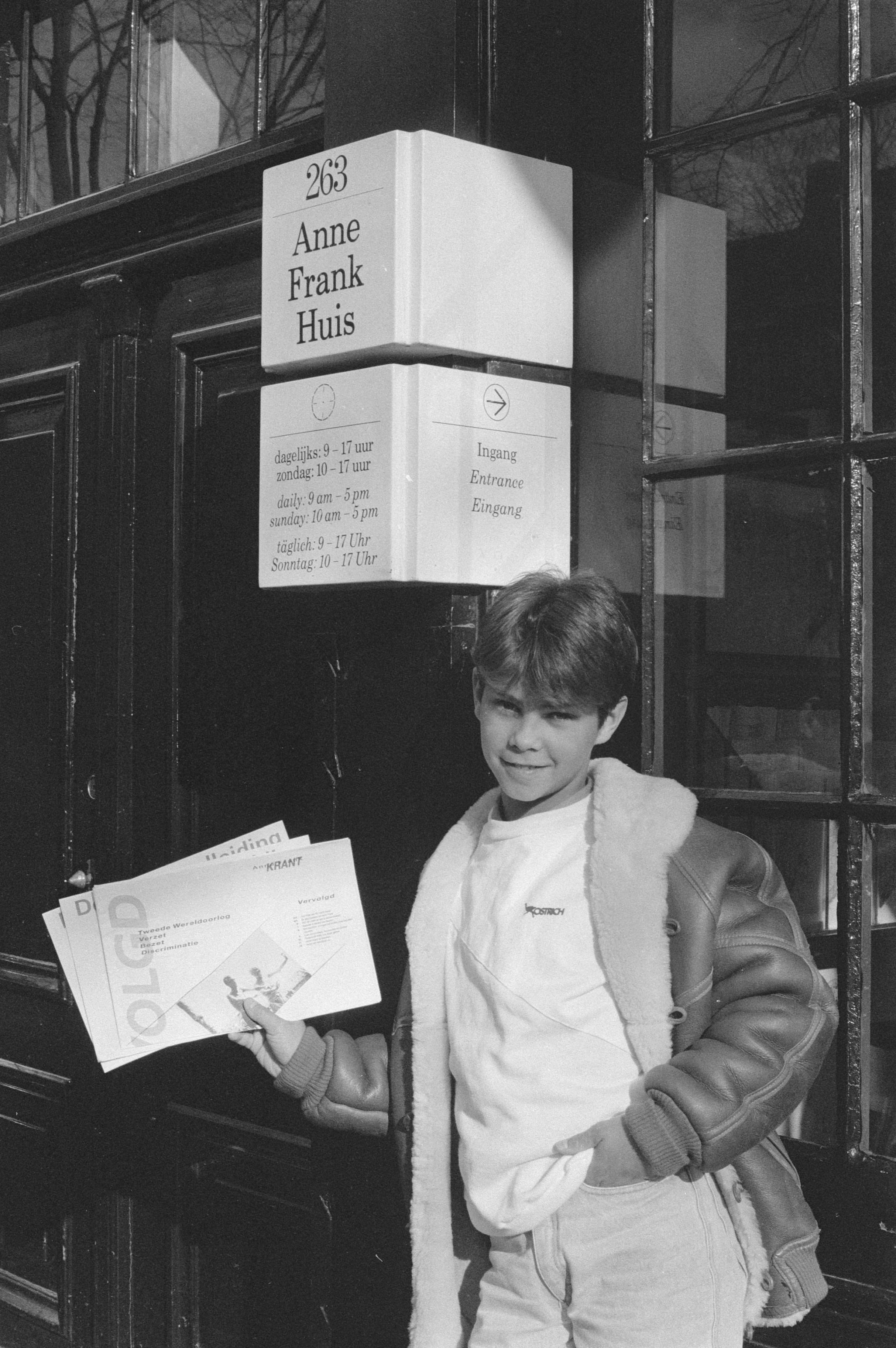 Collectie / Archief : Fotocollectie Anefo Reportage / Serie : [ onbekend ] Beschrijving : Eerste exemplaar Anne Frank krant uitgereikt aan Danny de Munk ; met krant voor het Anne Frank Huis in Amsterdam Datum : 18 maart 1985 Locatie : Amsterdam, Noord-Holland Trefwoorden : acteurs, kranten, toneelspelers Persoonsnaam : Anne Frank Huis, Danny de Munk Fotograaf : Vollebregt, Sjakkelien / Anefo Auteursrechthebbende : Nationaal Archief Materiaalsoort : Negatief (zwart/wit) Nummer archiefinventaris : bekijk toegang 2.24.01.05 Bestanddeelnummer : 933-2693